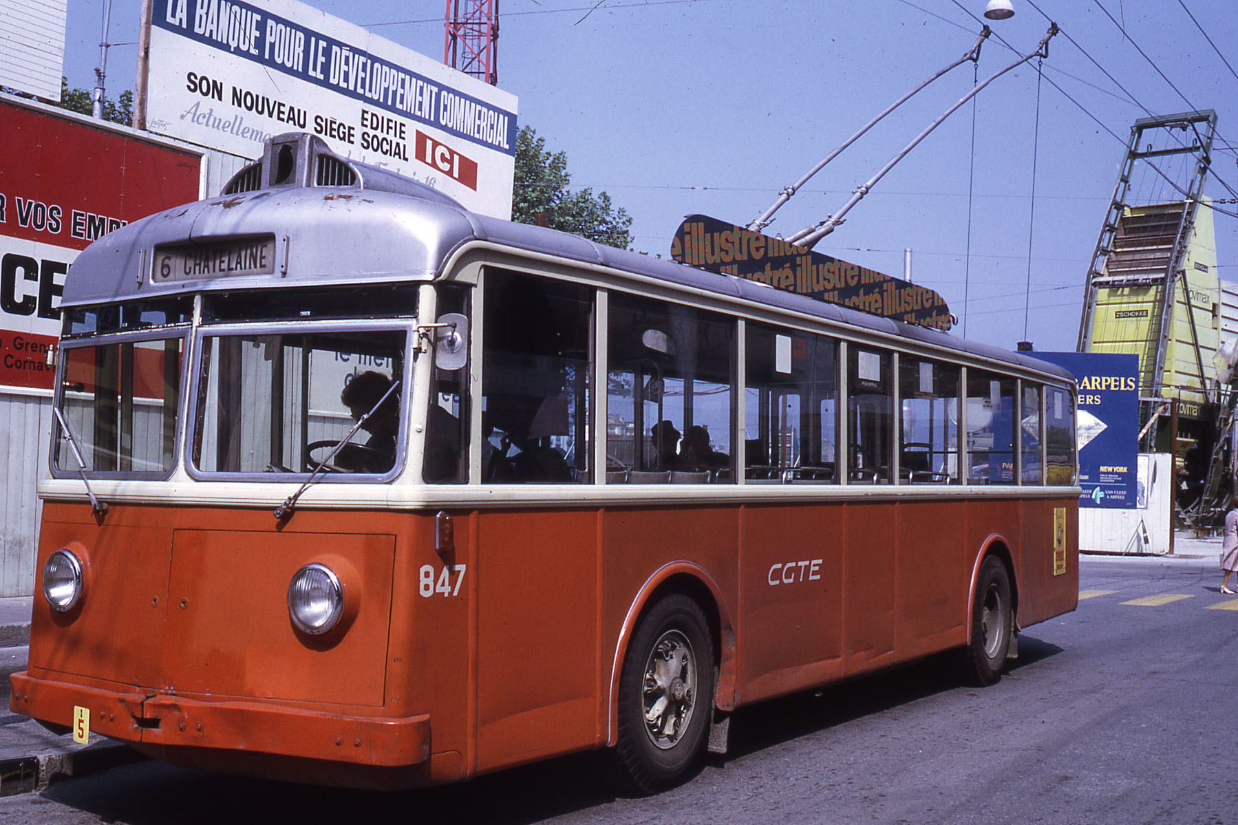 Un trolleybus FBW TR51 de Genève